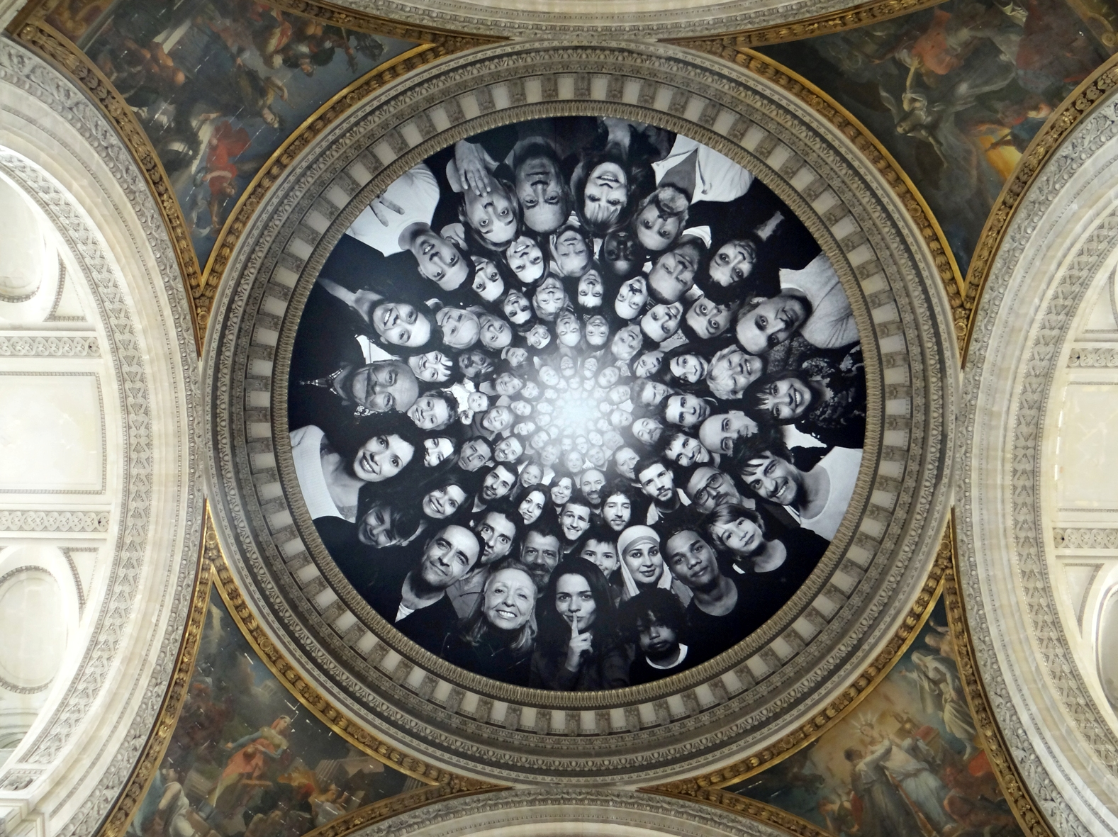 L'artiste JR expose aussi sous le dôme (en travaux à l'extérieur) Le Centre des monuments nationaux a choisi de confier à l’artiste contemporain JR la création d’une œuvre participative inspirée du projet INSIDE OUT, porteur des valeurs universelles et humanistes incarnées par le Panthéon. Pour réaliser cette œuvre qui investit aujourd'hui la bâche de chantier recouvrant le tambour du monument, des portraits ont été collectés durant le mois de mars 2014 sur ce site internet et dans neuf monuments nationaux grâce à l’itinérance du camion photographique de JR. Le dôme, la coupole et le sol du Panthéon sont ainsi recouverts aujourd’hui de l'installation de JR. Extrait du site : Site officiel du Panthéon